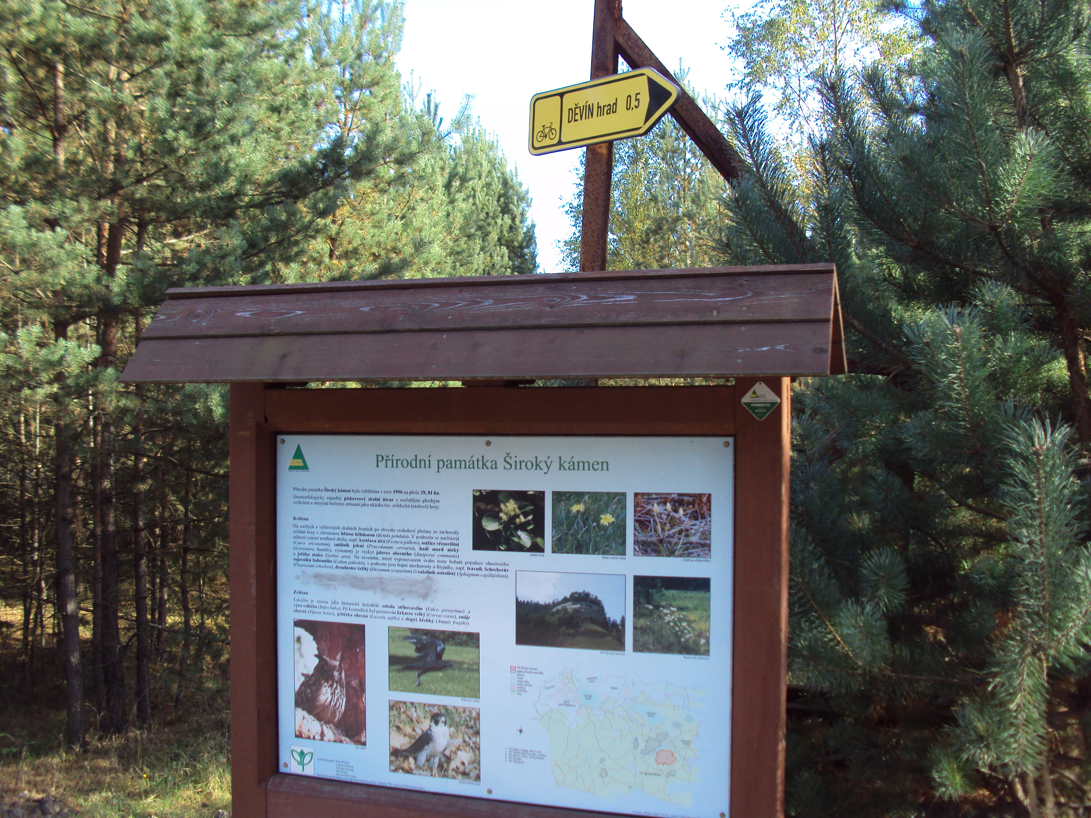 Přírodní památka Široký kámen 3 km JV od Hamr na Jezeře